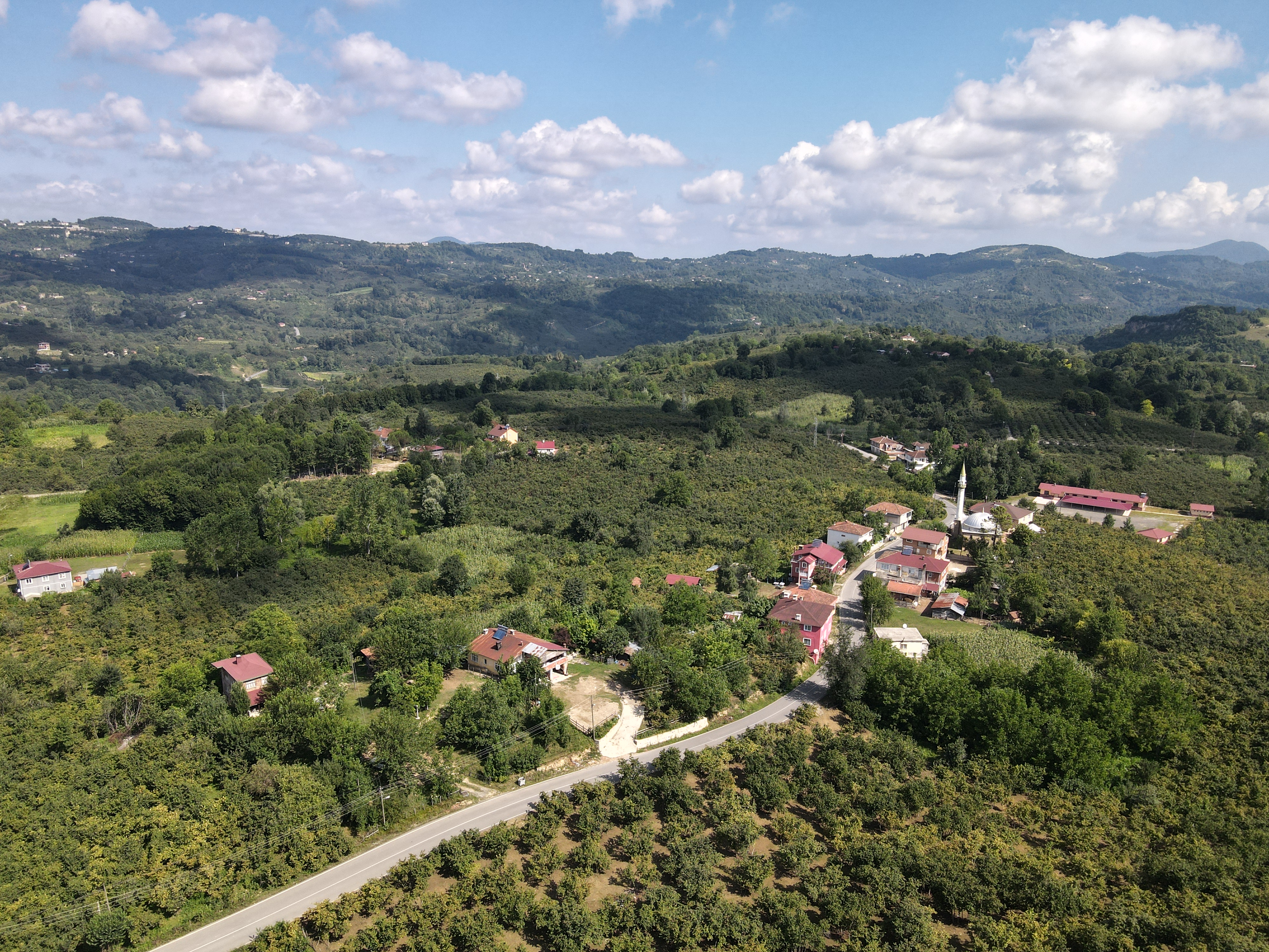 Alivara köyünün genel görünümü